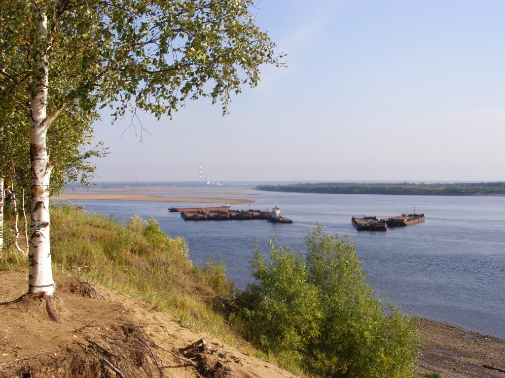 Река Печора (в г. Печора)